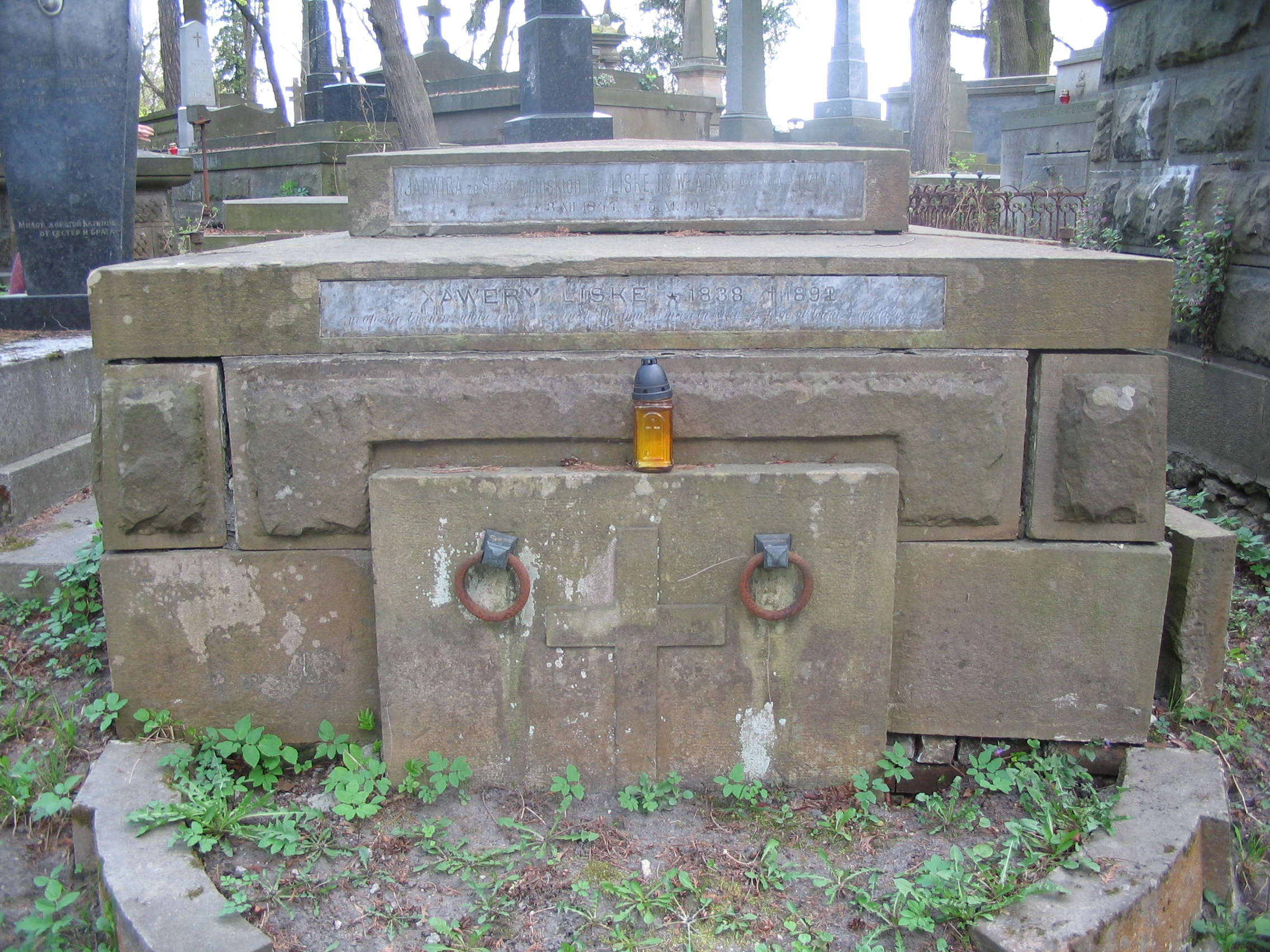 Grób Ksawergo Liske na cmentarzu Łyczakowskim we Lwowie.